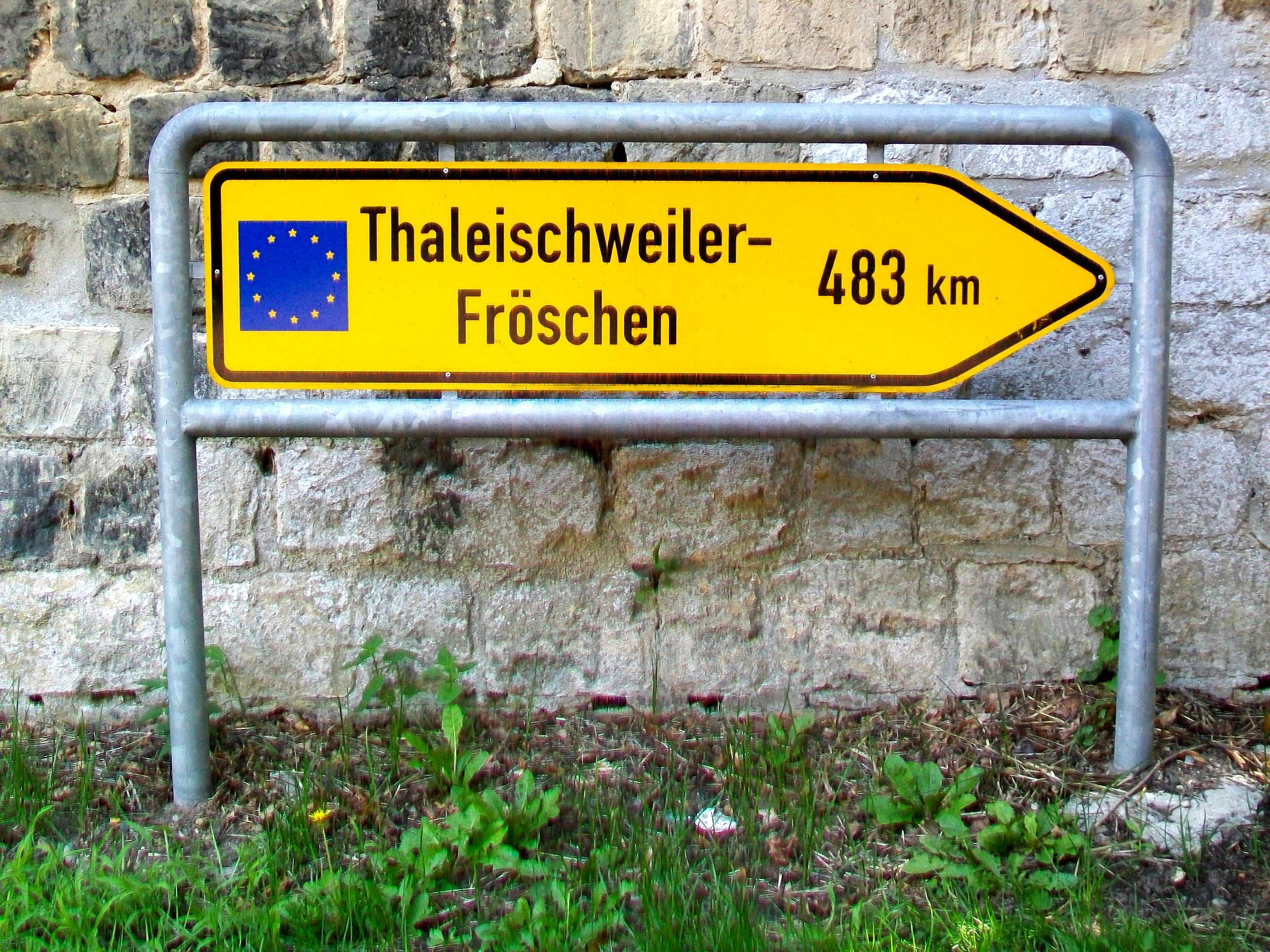 Panneau routier allemand indiquant le chemin vers la commune jumelée, en Palatinat. Carrefour rue Danièle-Casanova / RD 78.